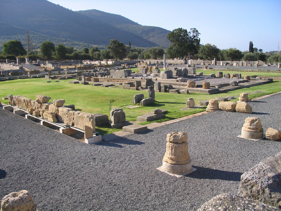 Vue des ruines du sanctuaire de l'Asclépiéion, Messène (Grèce) en 2005